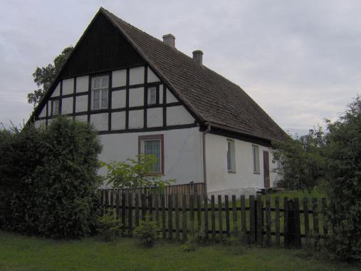 Żółwia Błoć - dom